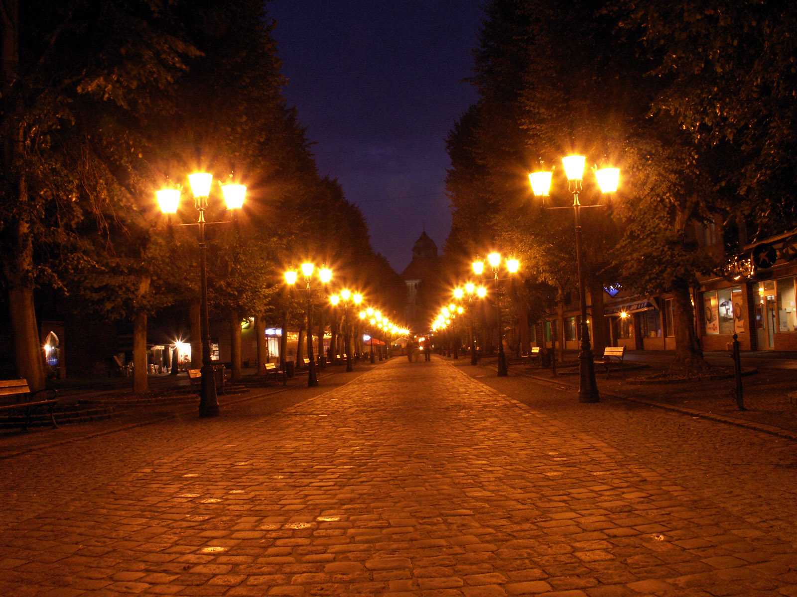 ul. Nowobramska nocą - Słupsk